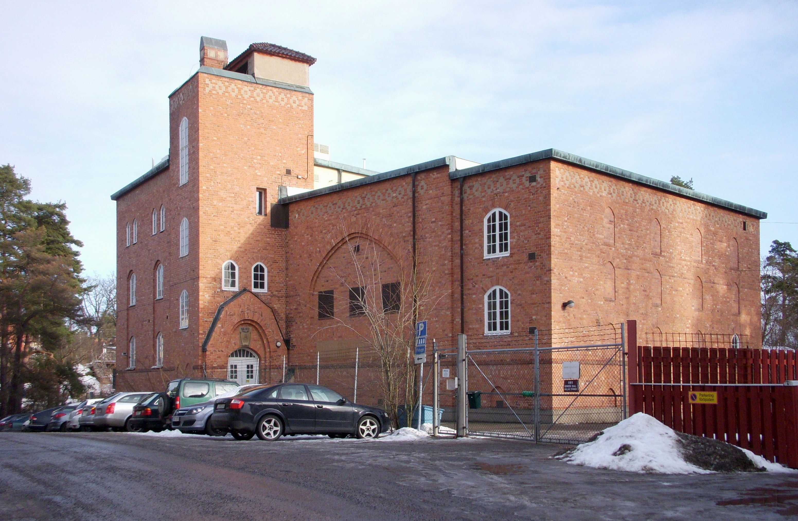 Lillsjöstationen i Ulvsunda byggd 1913 efter ritningar av Gustaf de Frumerie.